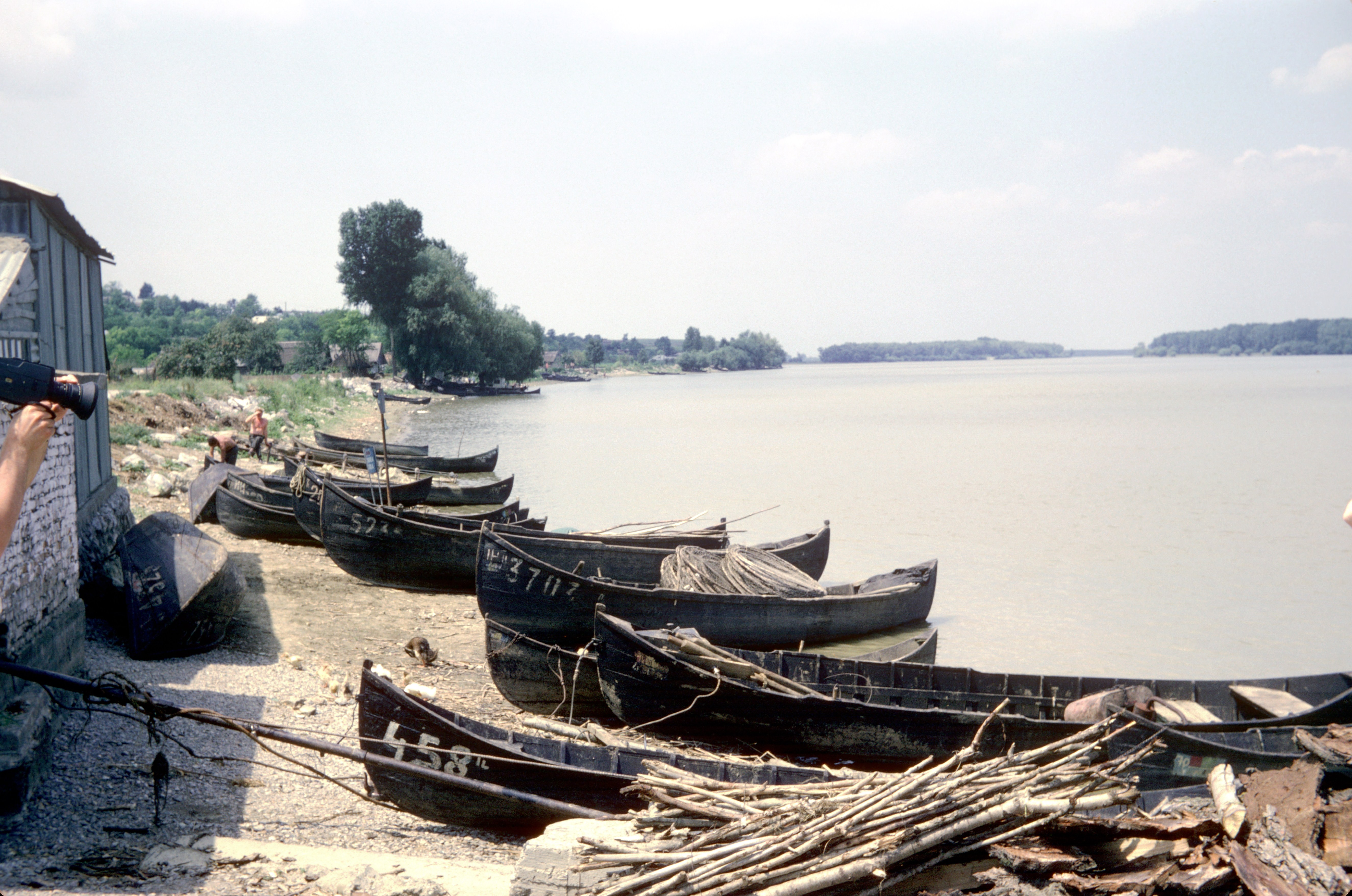 Dans le Delta du Danube, sur une des rives du bras Saint-Georges (Sfântu Gheorghe), un groupe de barques de pêche traditionnelles. Dans l’ une de ces barques on peut voir des filets de pêche. En roumain, le nom du type de ces barques est « Lotcă » (« barque de pêche »). Photographie prise entre Nufăru et Mahmudia. Entre Nufăru et Mahmudia (Delta du Danube), Județ de Tulcea, Roumanie.